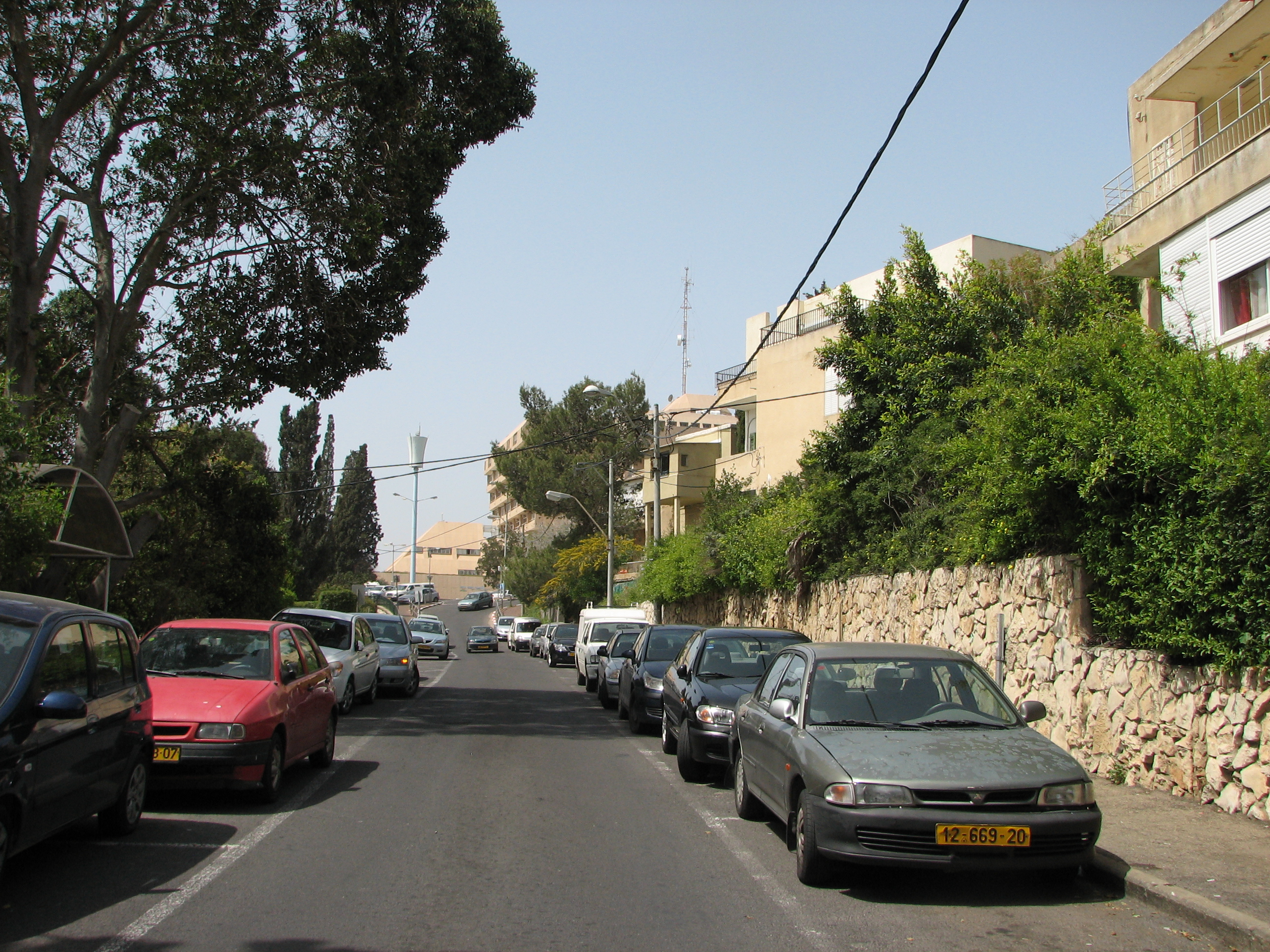 Ahuza, Haifa, Israel שכונת אחוזה, או בשמה המלא אחוזת שמואל, נוסדה בשנות השלושים של המאה העשרים, על הר הכרמל במקום התיישבו בתחילה 22 משפחות. נקראת על שמו של הנציב העליון הרברט סמואל רחוב סמולנסקין, ברקע בית חולים כרמל